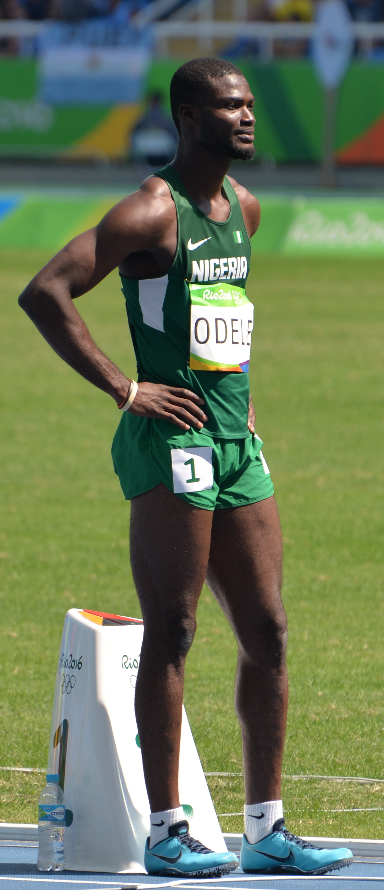 Séries du 200m Homme aux JO de Rio 2016